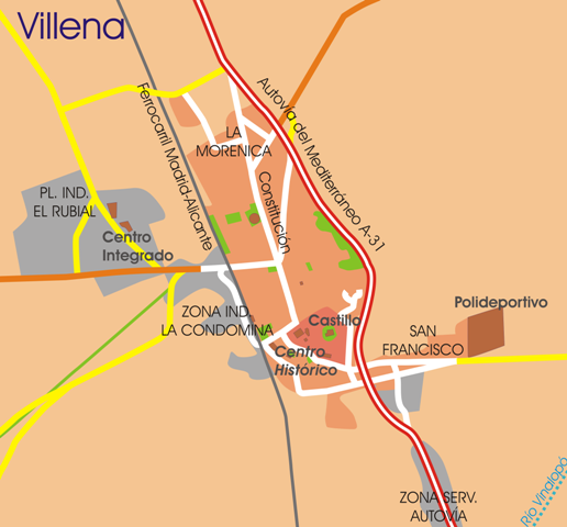 Accesos de Villena